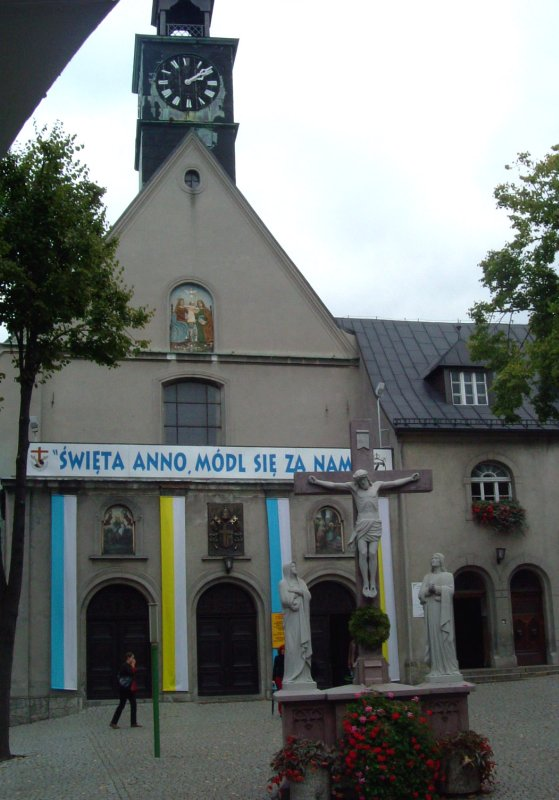 Klosterkirche auf dem Annaberg in Oberschlesien.